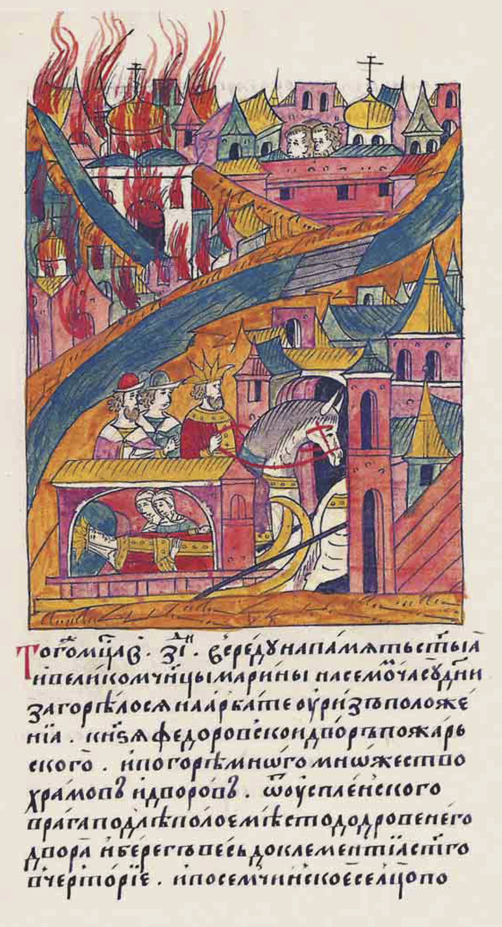 Лицевой летописный свод "В том же месяце в 17 день в среду, на память святой великомученицы Марины, в седьмом часу дня, загорелся на Арбате, у церкви Риз Положения, двор князя Федора Пожарского. И погорело многое множество храмов и дворов от Успенского оврага подле открытого места до дровяного двора, и берег весь до церкви святого Клементия в Черторье, и по Семчинское сельцо, и до [церкви Пречистой на Могилицах, и Арбат весь, и за Арбат по Новинский монастырь. А царица и великая княгиня Анастасия в то время была больна, и царь и великий князь великую княгиню проводил в свое село в Коломенское с большим трудом, потому что болезнь ее была очень тяжела.]"